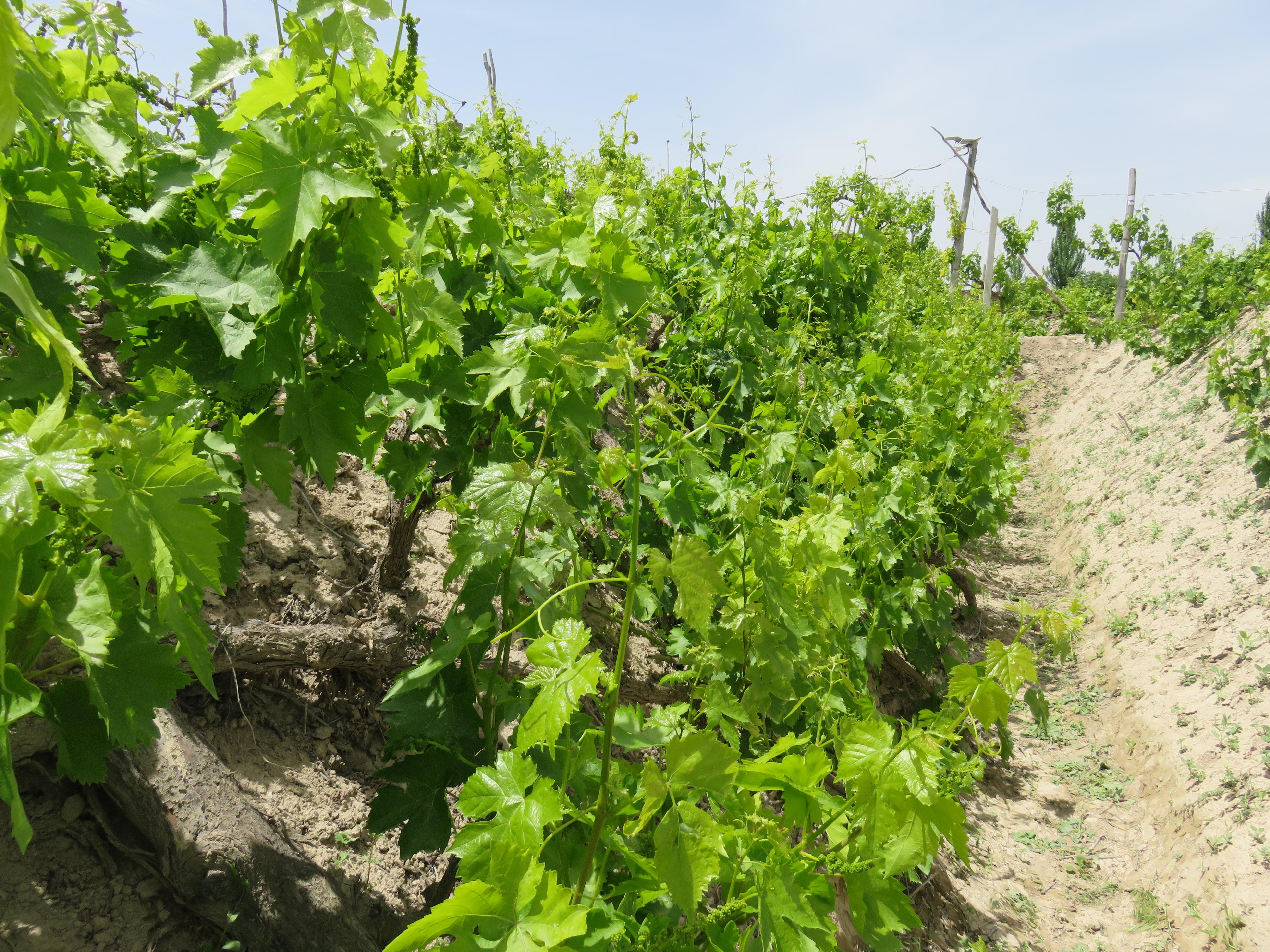 درخت انگور (تاک) ملکان